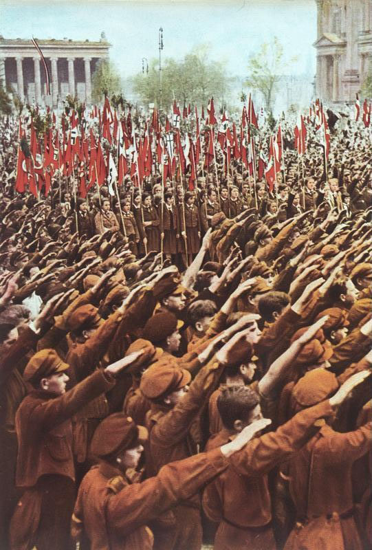 Berlin, Lustgarten, Kundgebung der HJ Berlin, Lustgarten.- Kundgebung der Hitler-Jugend, Jugendliche mit Hitler-Gruß, NS-Fahnen Information added by Wikimedia users.